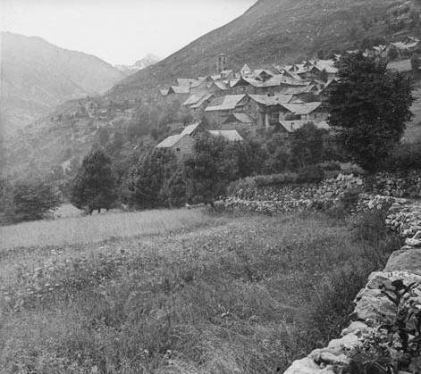 Vista general de Taüll. Frederic Bordas i Altarriba (ca. 1890)